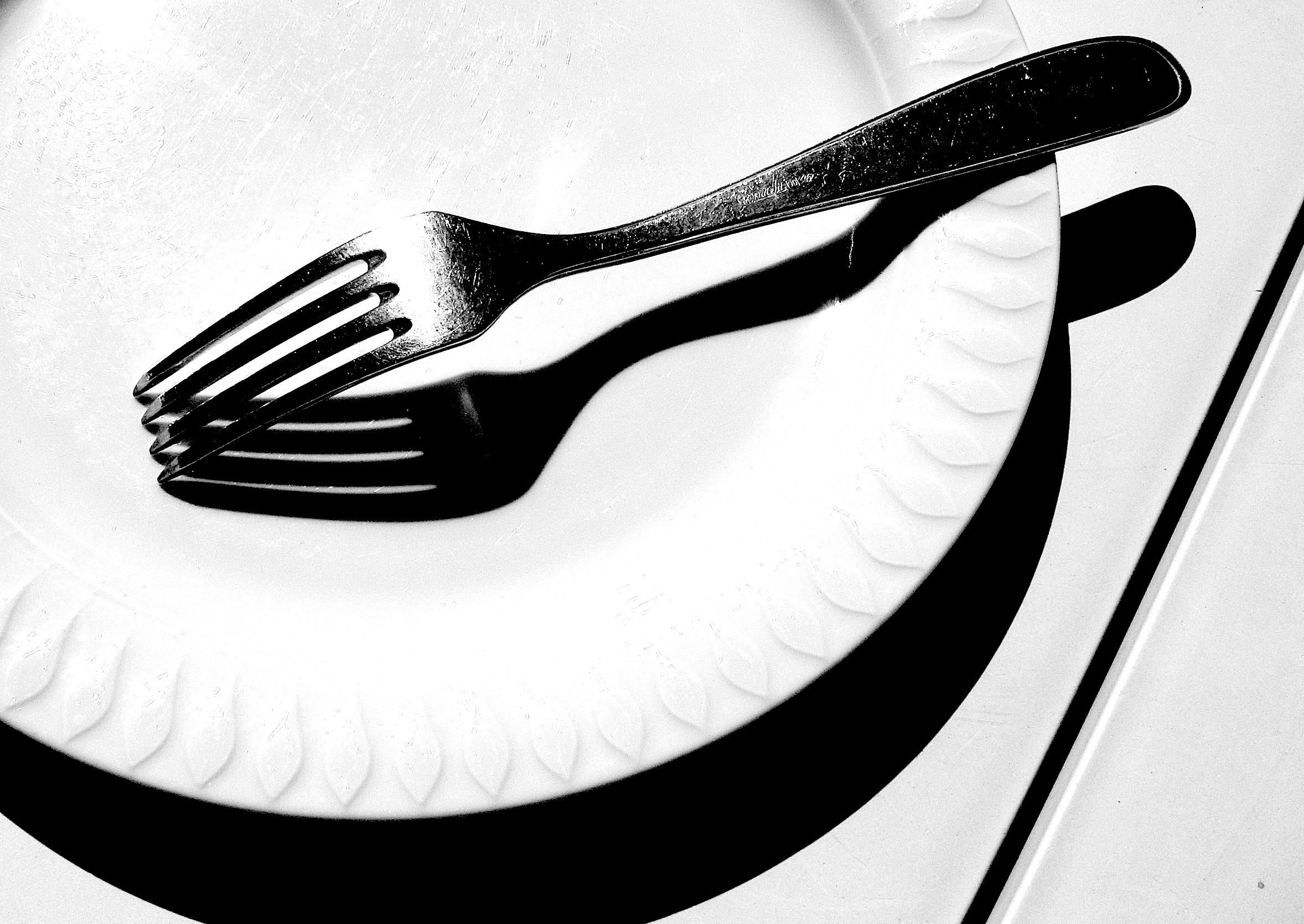 Eine Gabel auf einem Essteller bei hartem, gerichteten Sonnenlicht. Es entsteht ein Hell-Dunkel-Kontrast. Die Fotografie entstand in Anlehnung an eine Fotografie von André Kertesz: Gabel, 1928, Berlin.